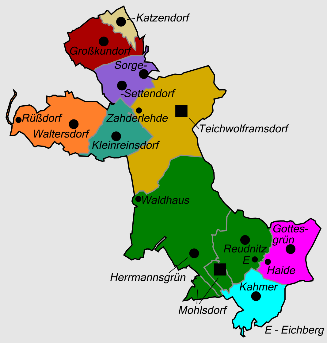 Gliederung der Gemeinde Mohlsdorf-Teichwolframsdorf ab 1. Oktober 1922